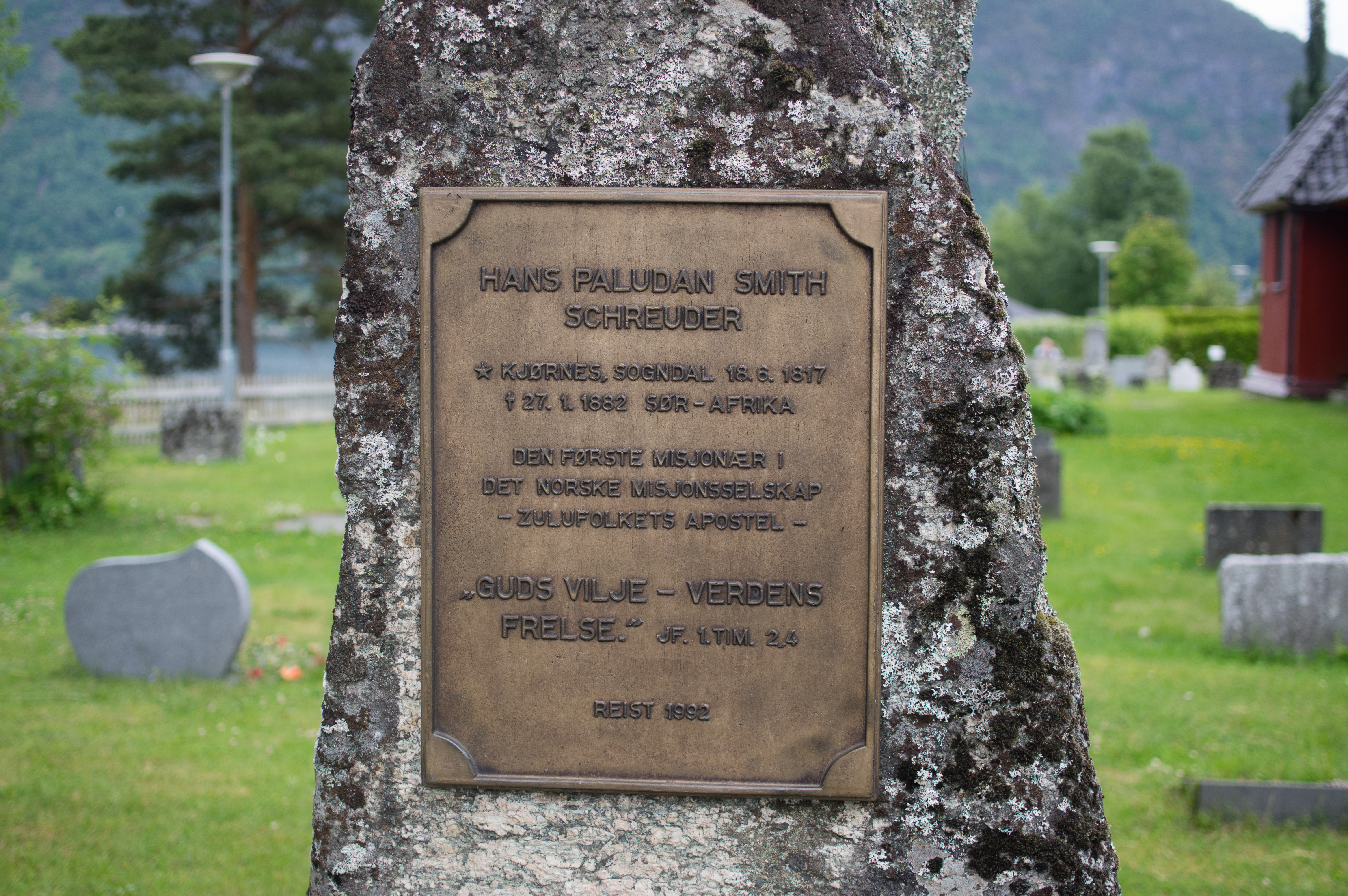 Minnestein for Hans Paludan Smith Schreuder ved Stedje kyrkje i Sogndal.